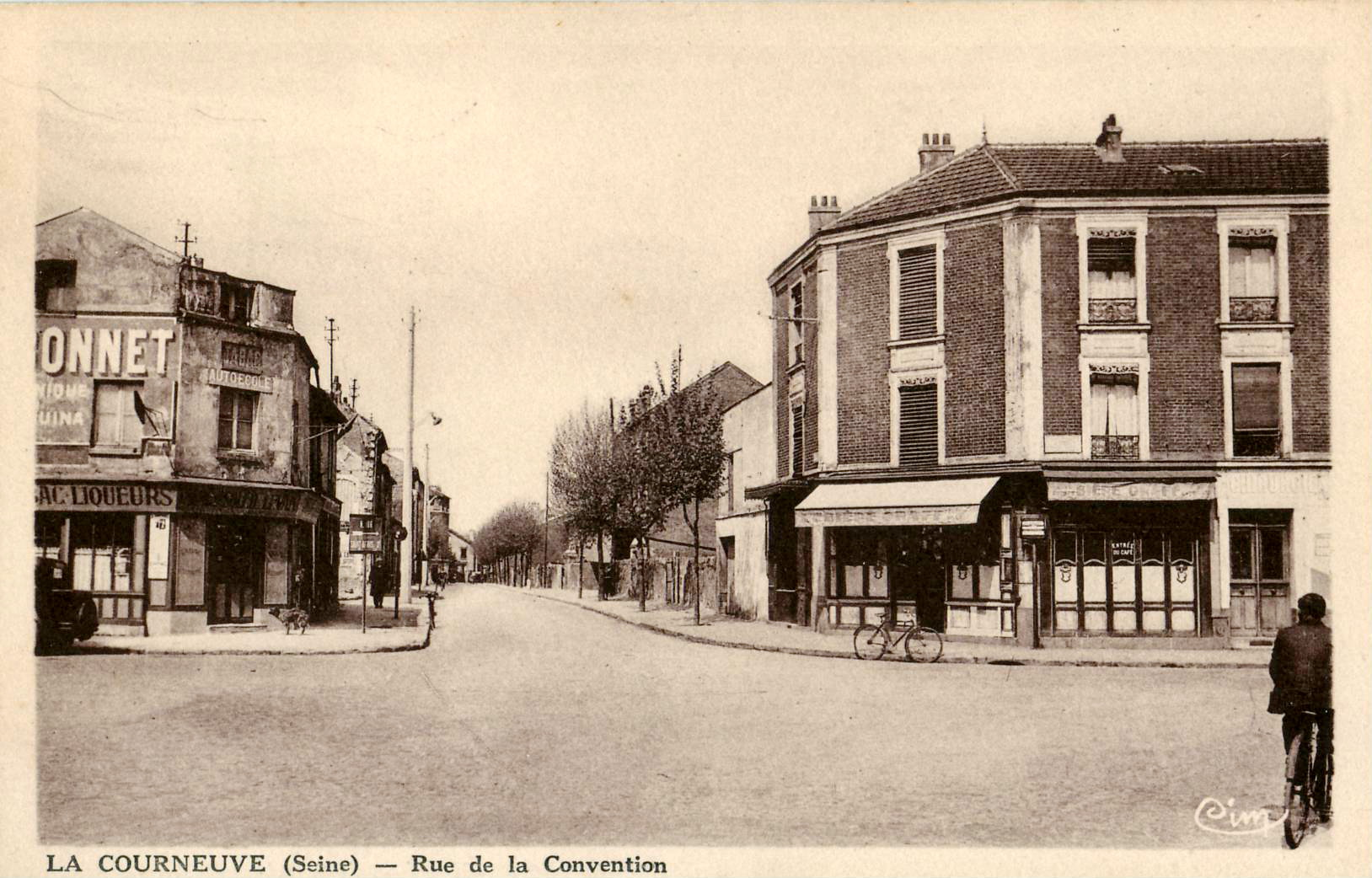 Carte postale ancienne éditée par CIM à Mâcon :LA COURNEUVE - Rue de la Convention